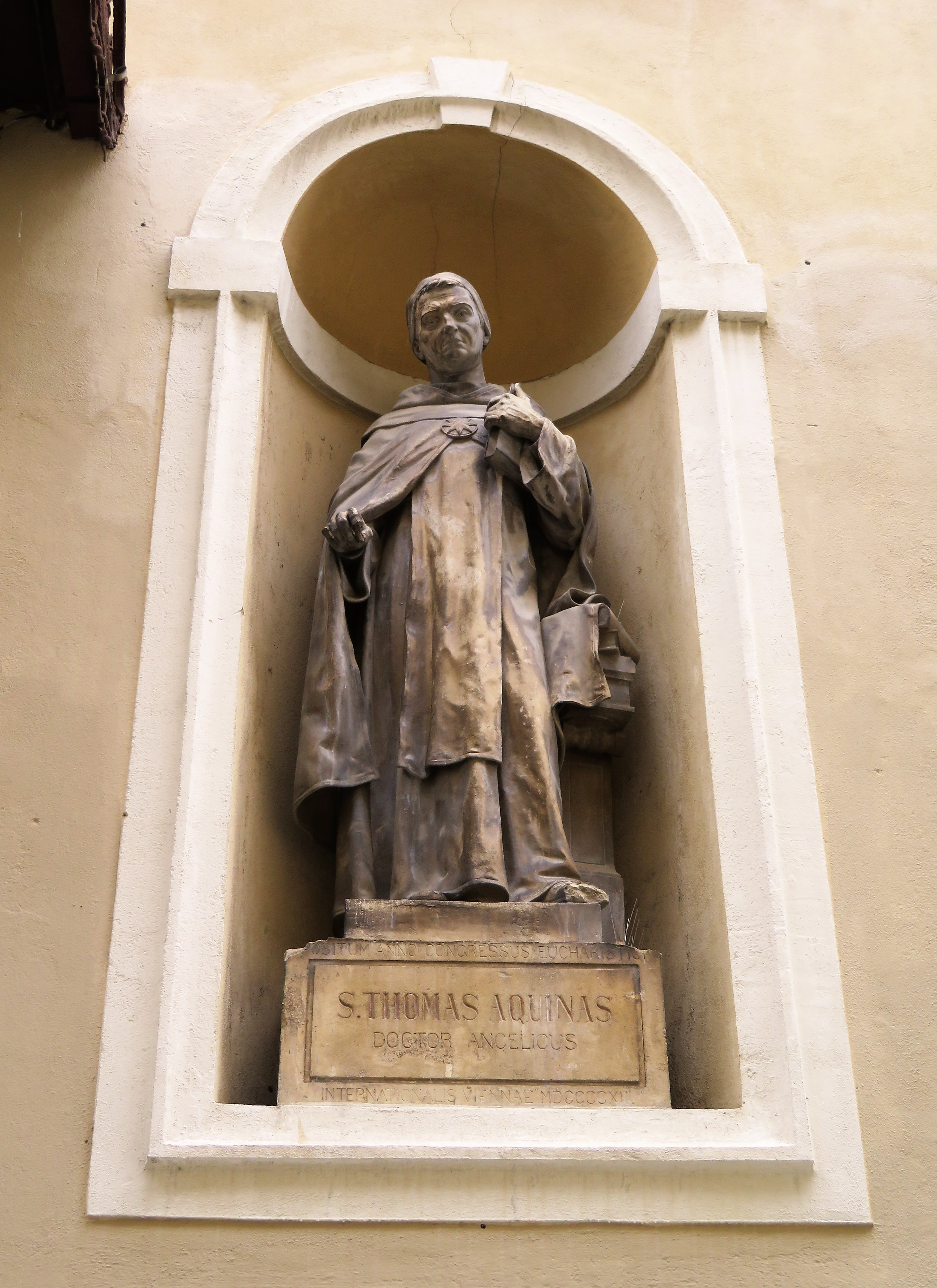 Standbeeld van de Italiaanse filosoof en theoloog Thomas van Aquino op de St. Nicolaaskathedraal in Ljubljana, Slovenïe.